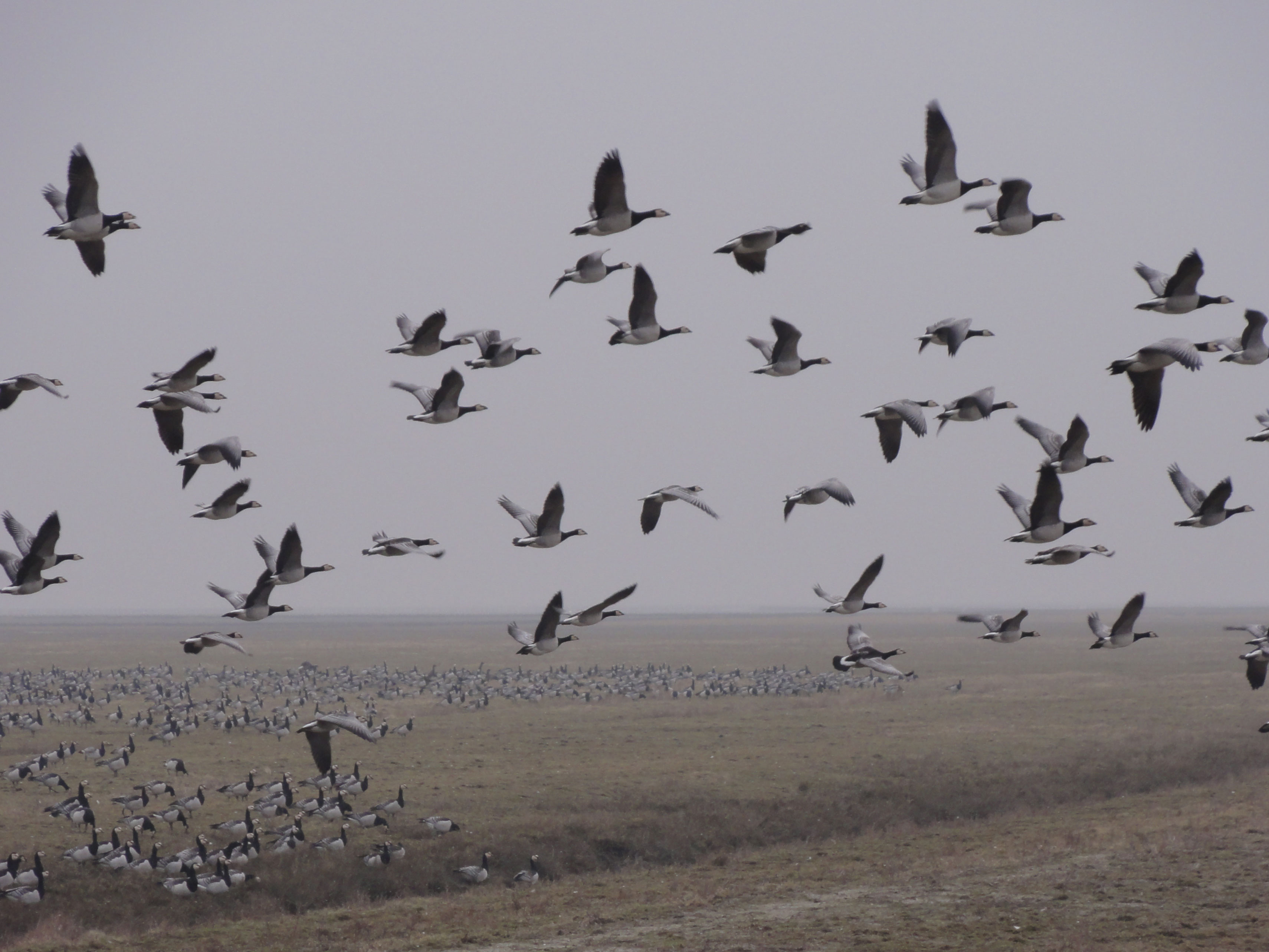 Kwelder in de Waddenzee ten noorden van de Noordpolder